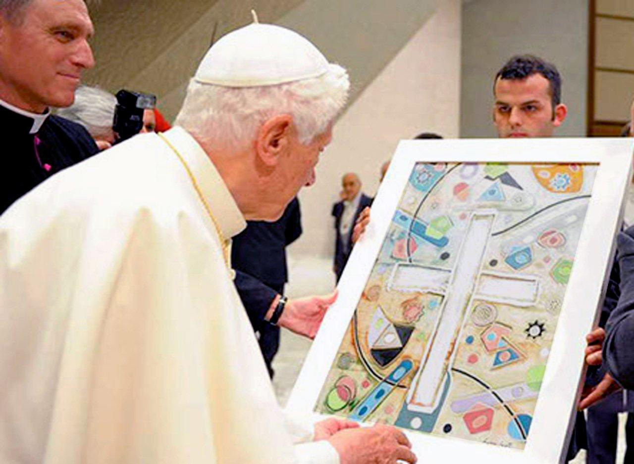 Il 28 novembre 2012 è stata donata a Sua Santità Papa Benedetto XVI da parte dell'A.N.F.E. (l'associazione internazionale che rappresenta gli emigrati italiani nel mondo) l'opera di Andrea Benetti realizzata nel 2009, intitolata “Omaggio a Karol Wojtyla”, acquisita nelle Collezioni del Vaticano. La donazione è avvenuta alla presenza di Andrea Benetti nella sala Nervi, presso la Città del Vaticano.